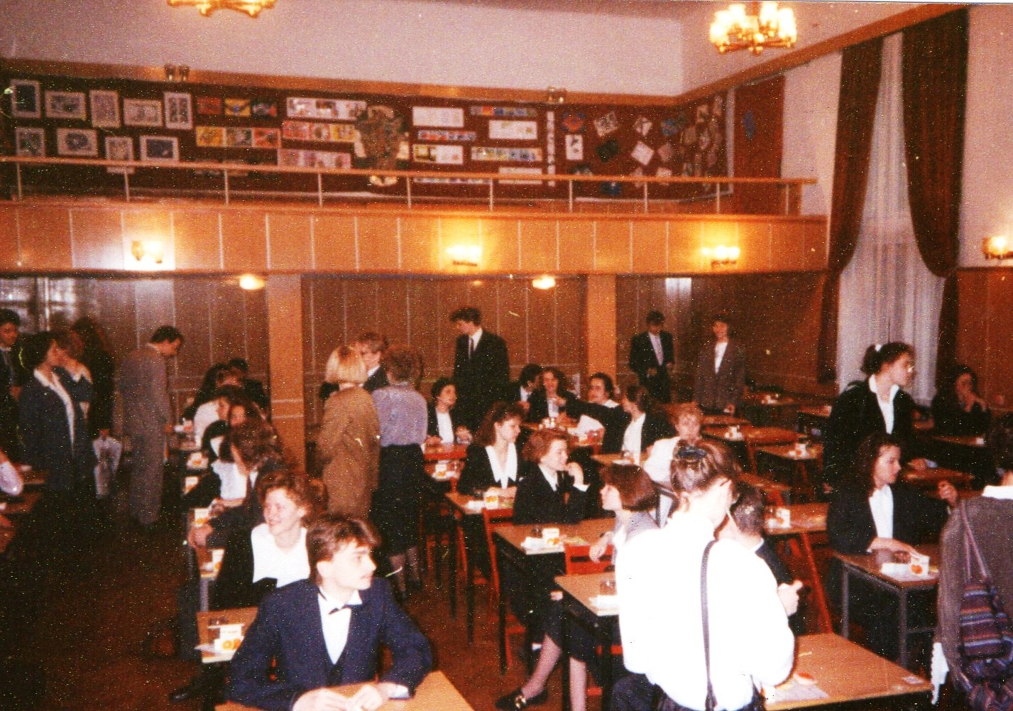 Matura w II LO w Poznaniu (ul. Matejki 8/10). Rok 1991.